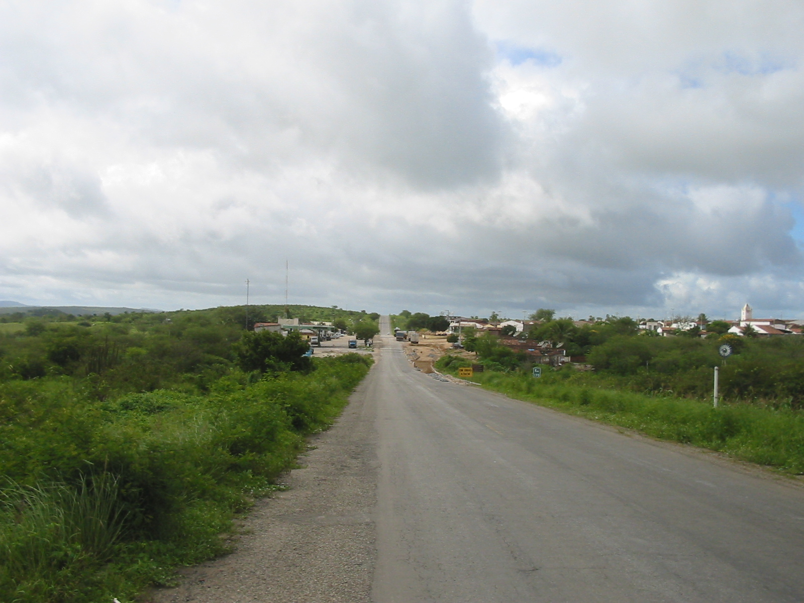 Alcantil (Paraíba), Brasil. Alcantil (Paraíba), Brazil.